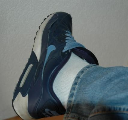 Sneaker met witte sokken. aan deze foto zijn geen auteursrechten verbonden.